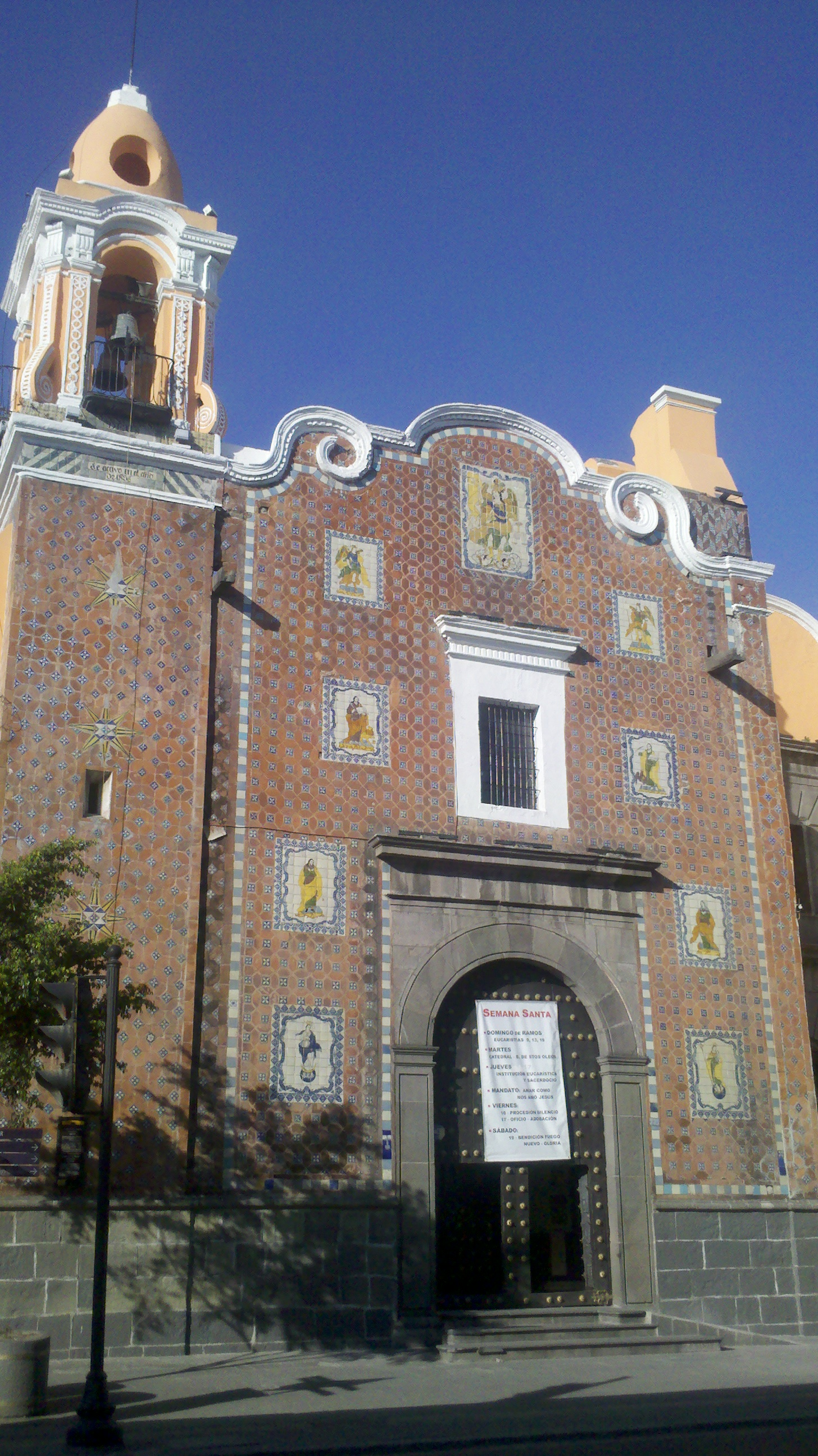 Templo de San Marcos Evangelista, Puebla, México. Siglo XVII. Avenida Reforma 730.